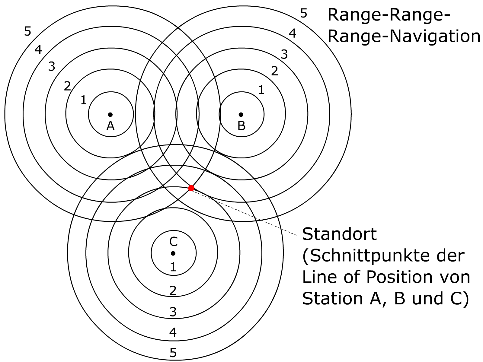 OMEGA Navigationssystem, Funktionsweise